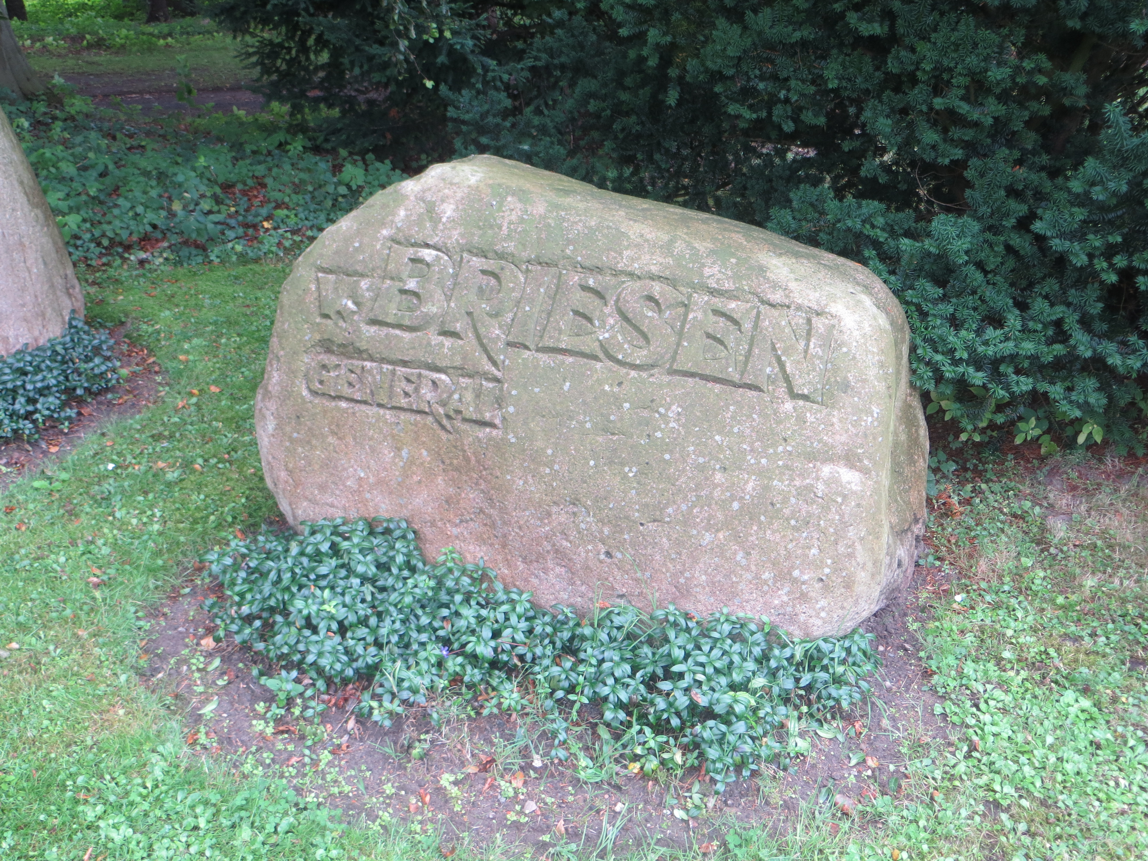 Von Briesenstein ausd er ehemaligen Briesen-Kaserne in Flensburg-Weiche. Heute Friedhof Friedenshügel.